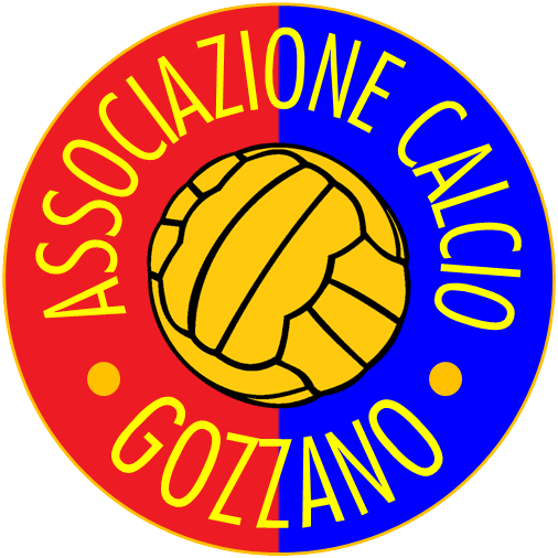 Old Logo AC GOZZANO